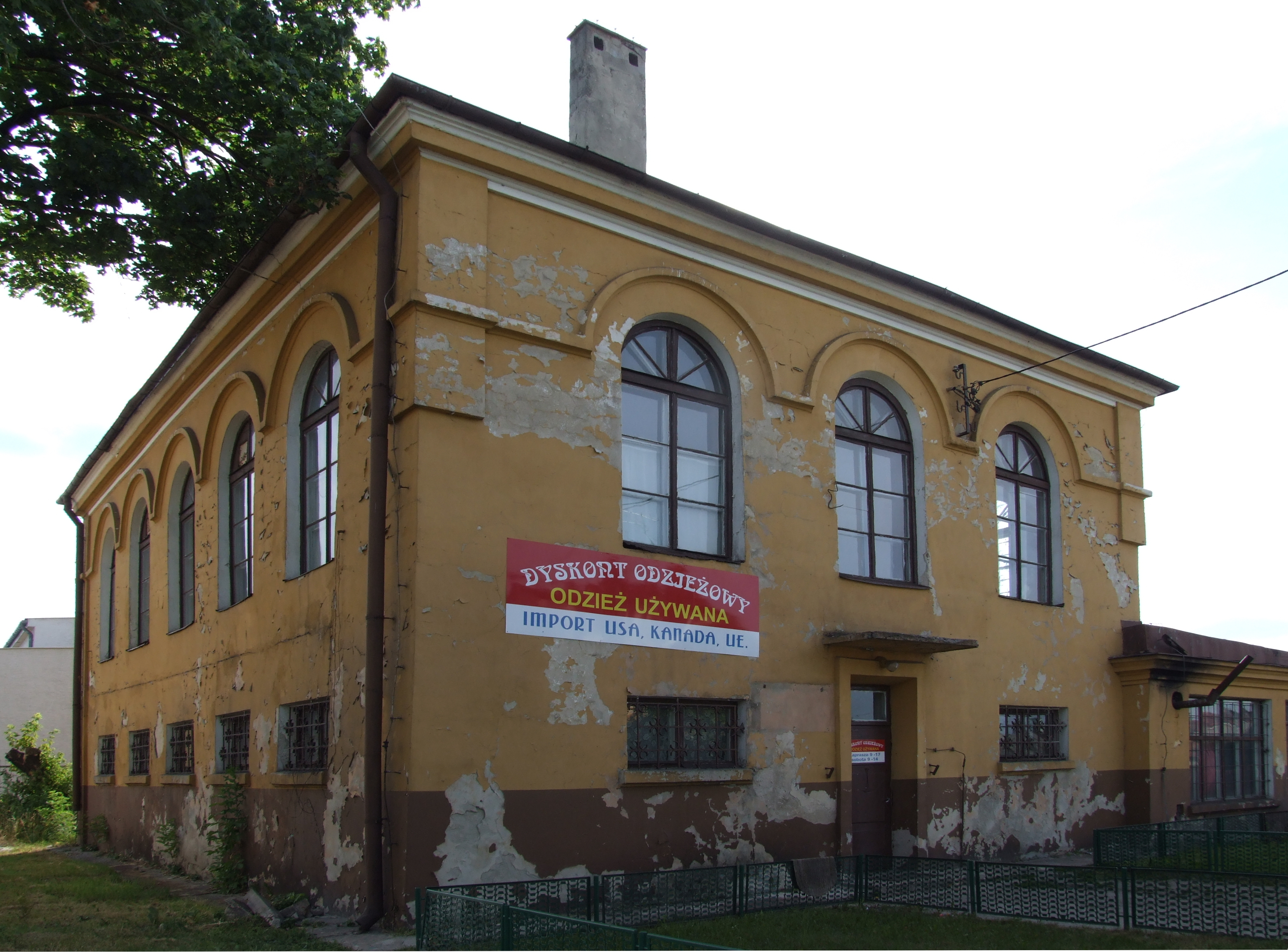 Synagogue in Parczew, Poland.